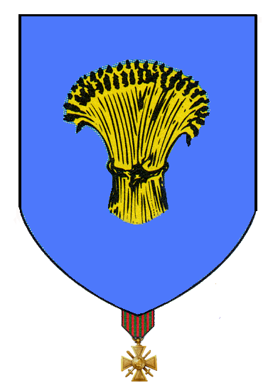 Blason de la ville de Ressons-sur-Matz